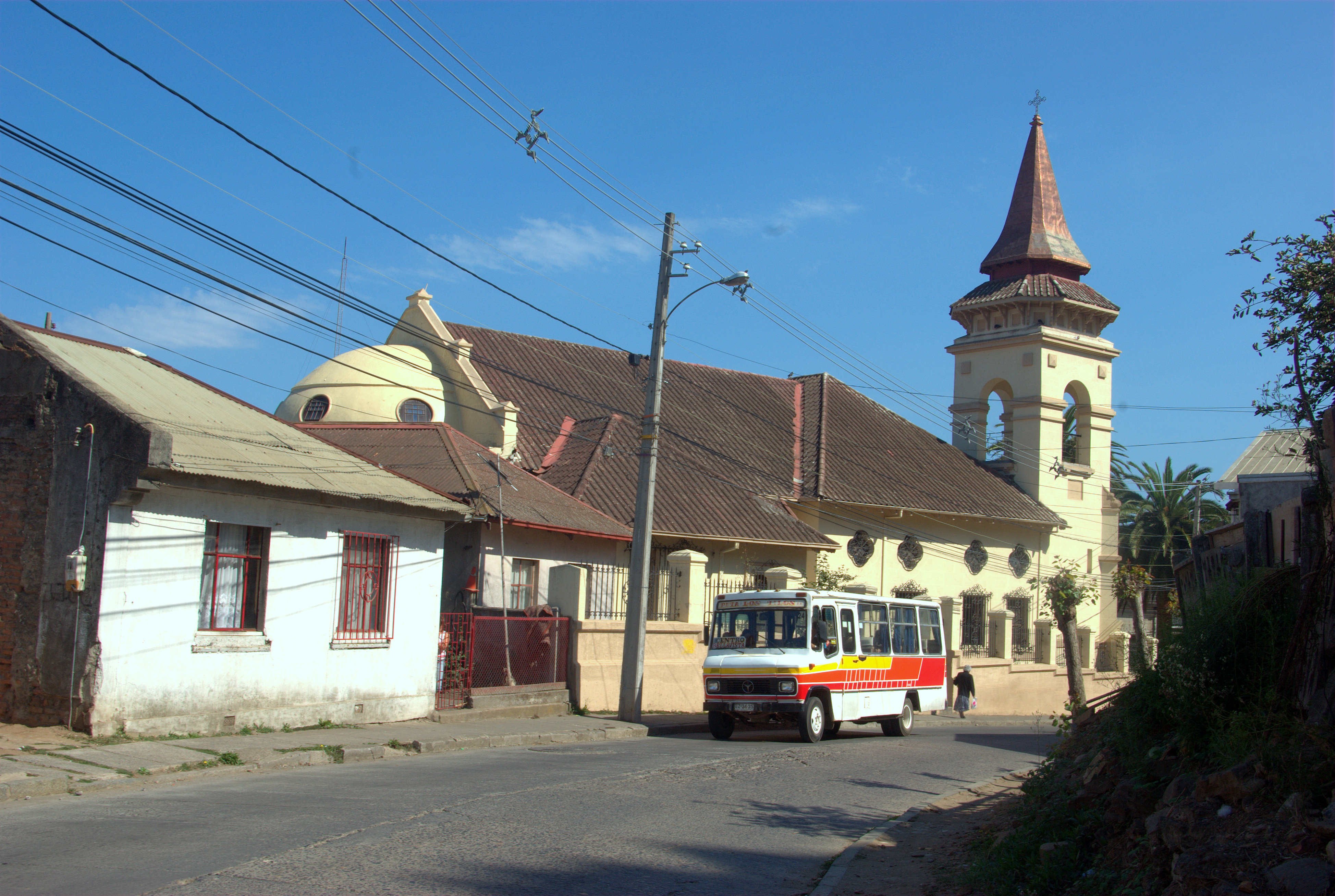 Iglesia Bellavista